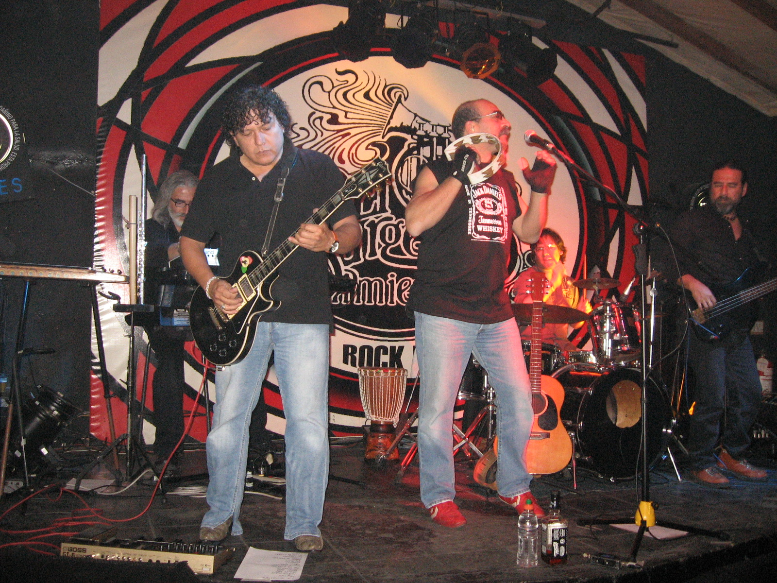 Rock peruvian band